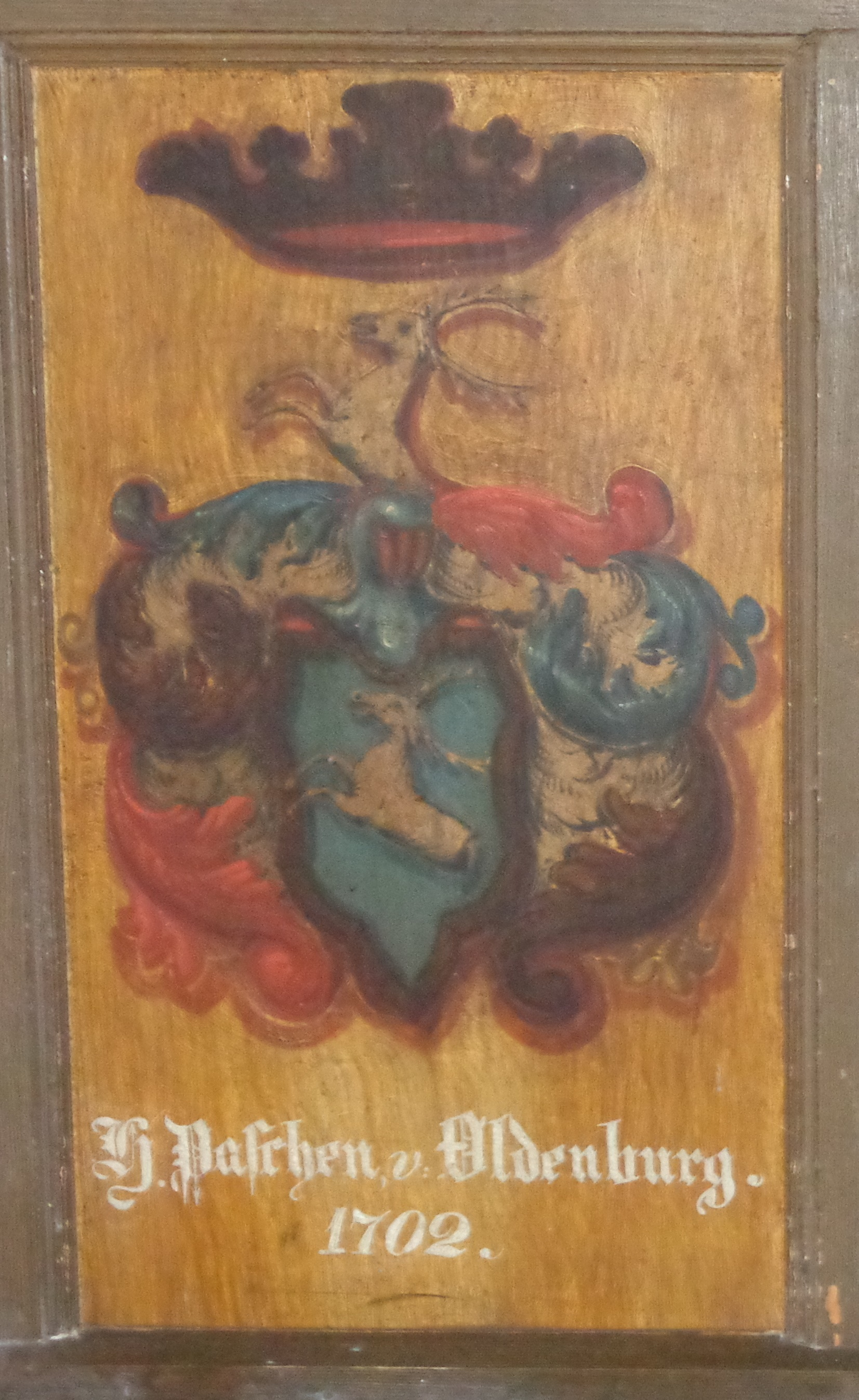 Wappen von Paschen von Oldenburg in der Dorfkirche Dobbin